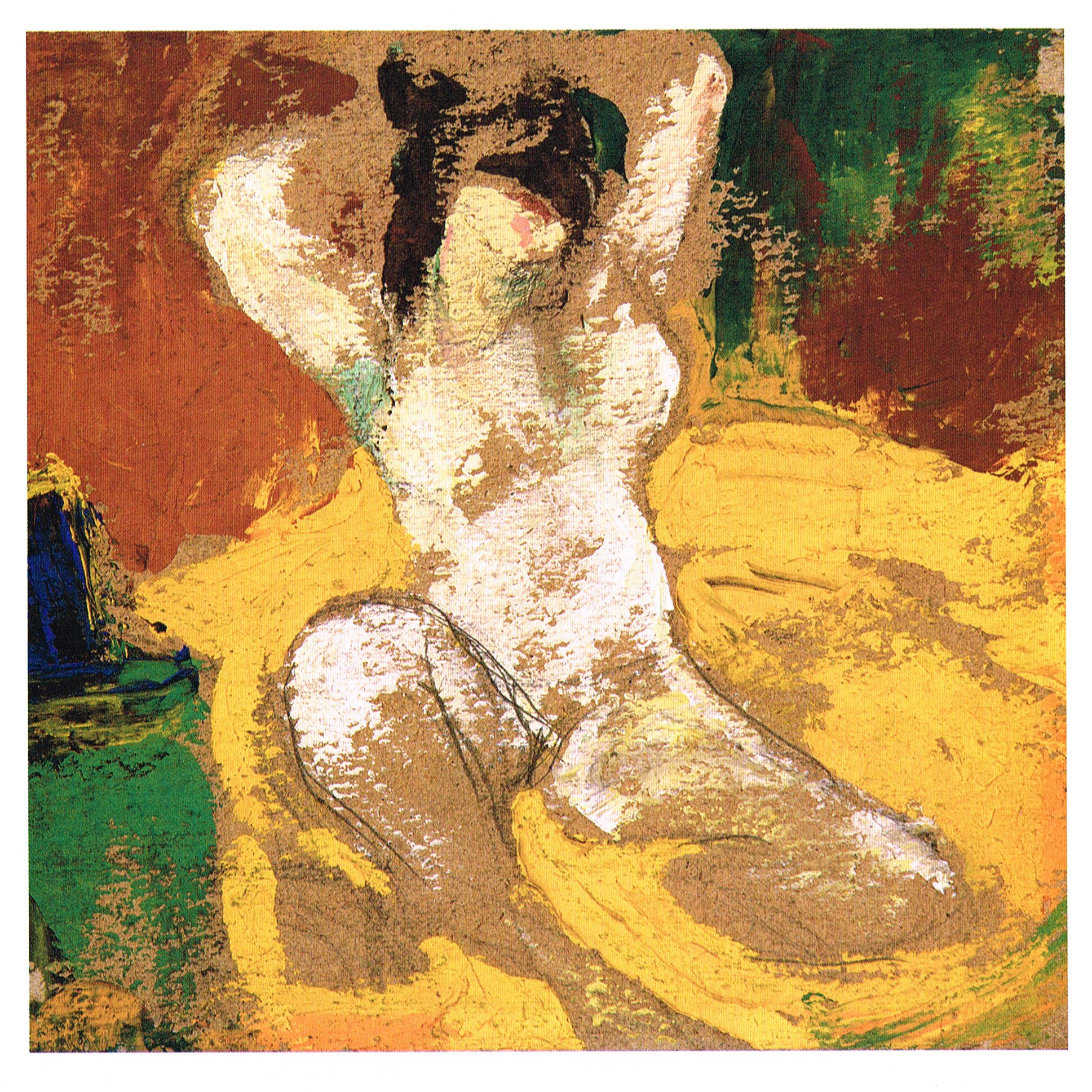 Автор Владимир Владимирович Кудряшев (25 июля 1902, Малые Яльчики Казанской губернии, Российская империя – 09 ноября 1944, Москва). График, скульптор, живописец